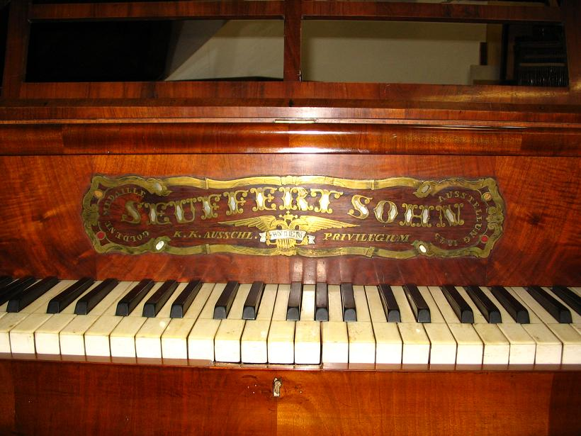 Inschrift auf Klaviaturdeckel